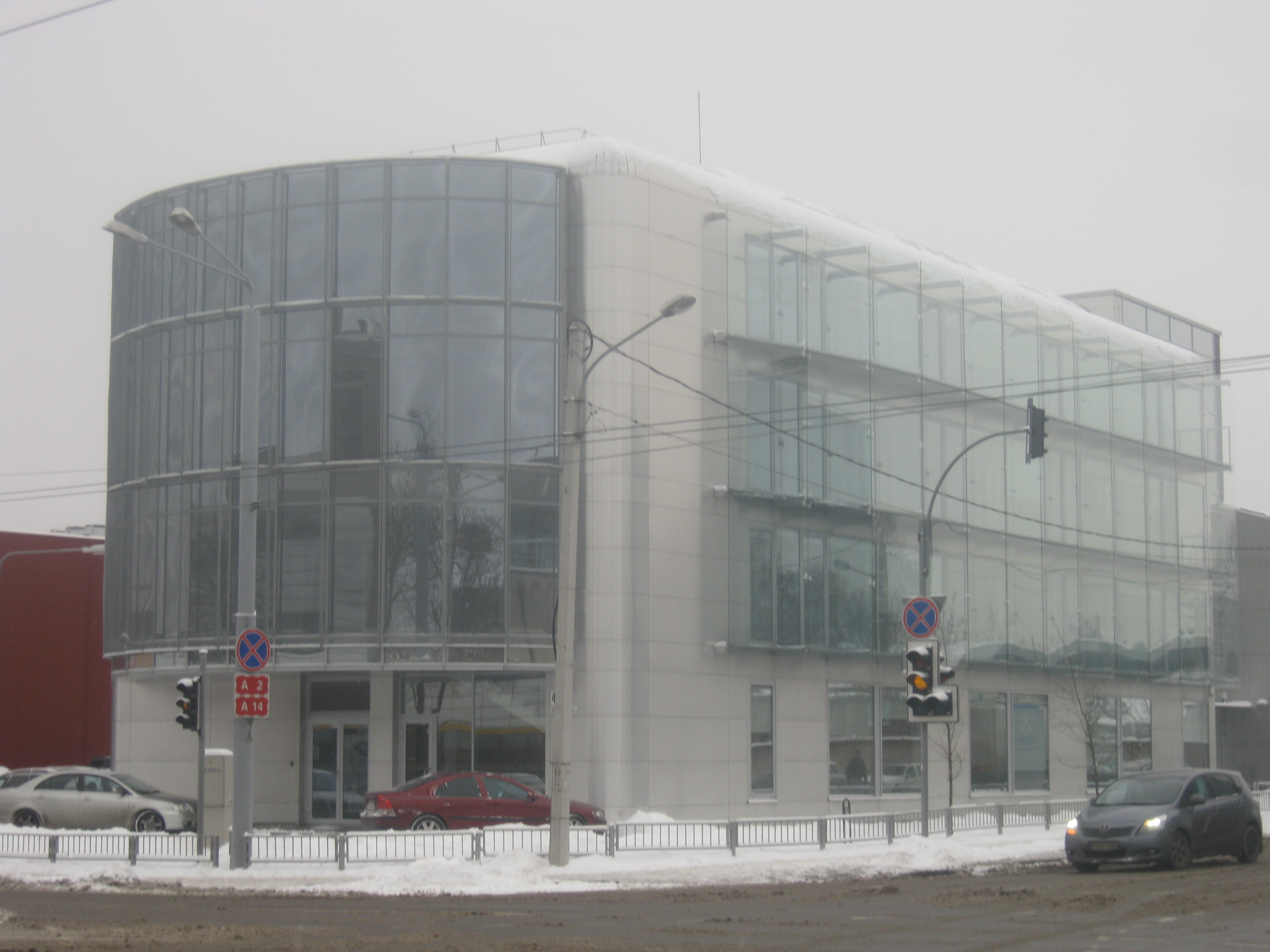 Valstybinė kelių transporto inspekcija prie LR Susisiekimo ministerijos